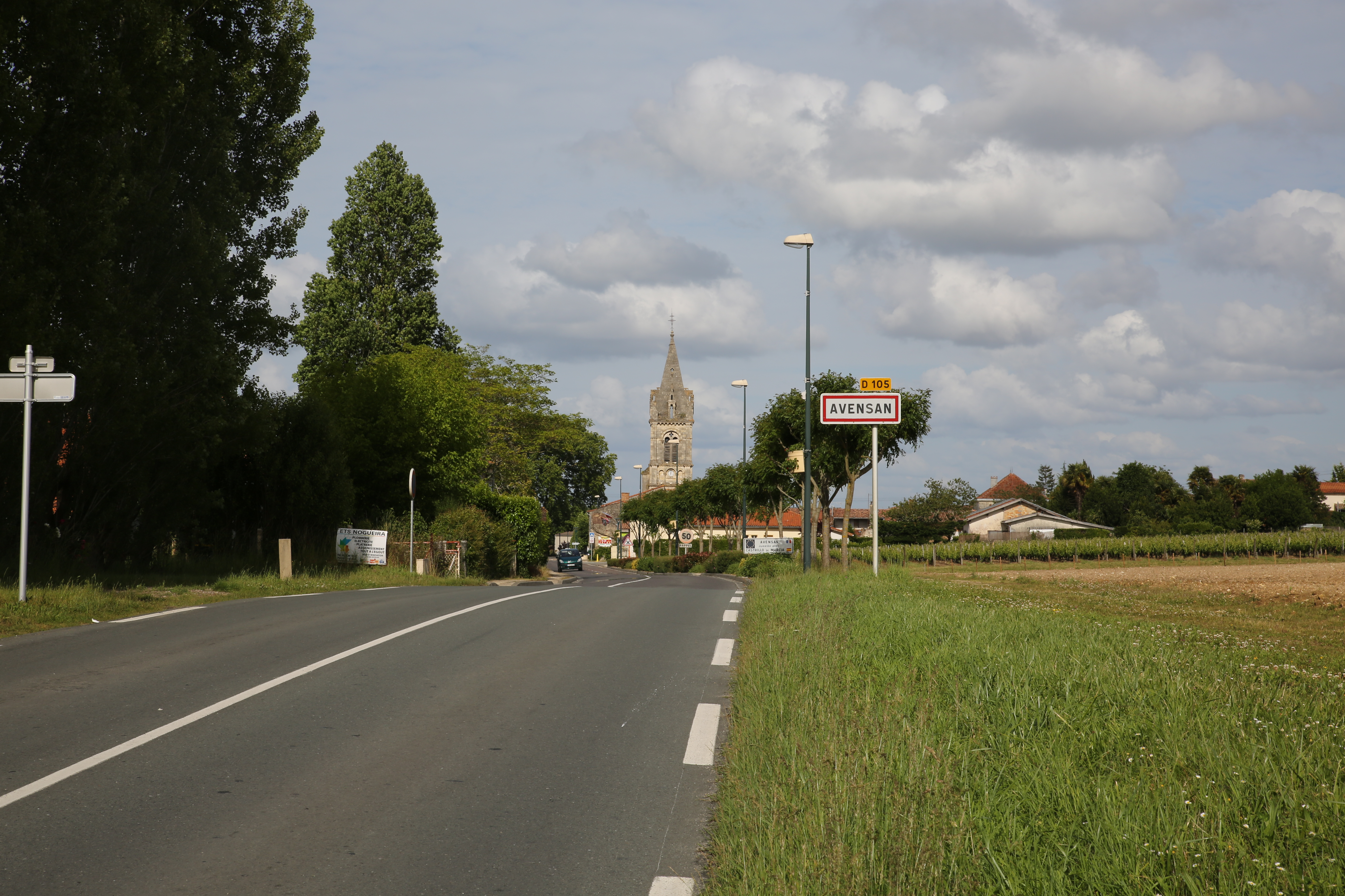 Entrée du bourg à Avensan